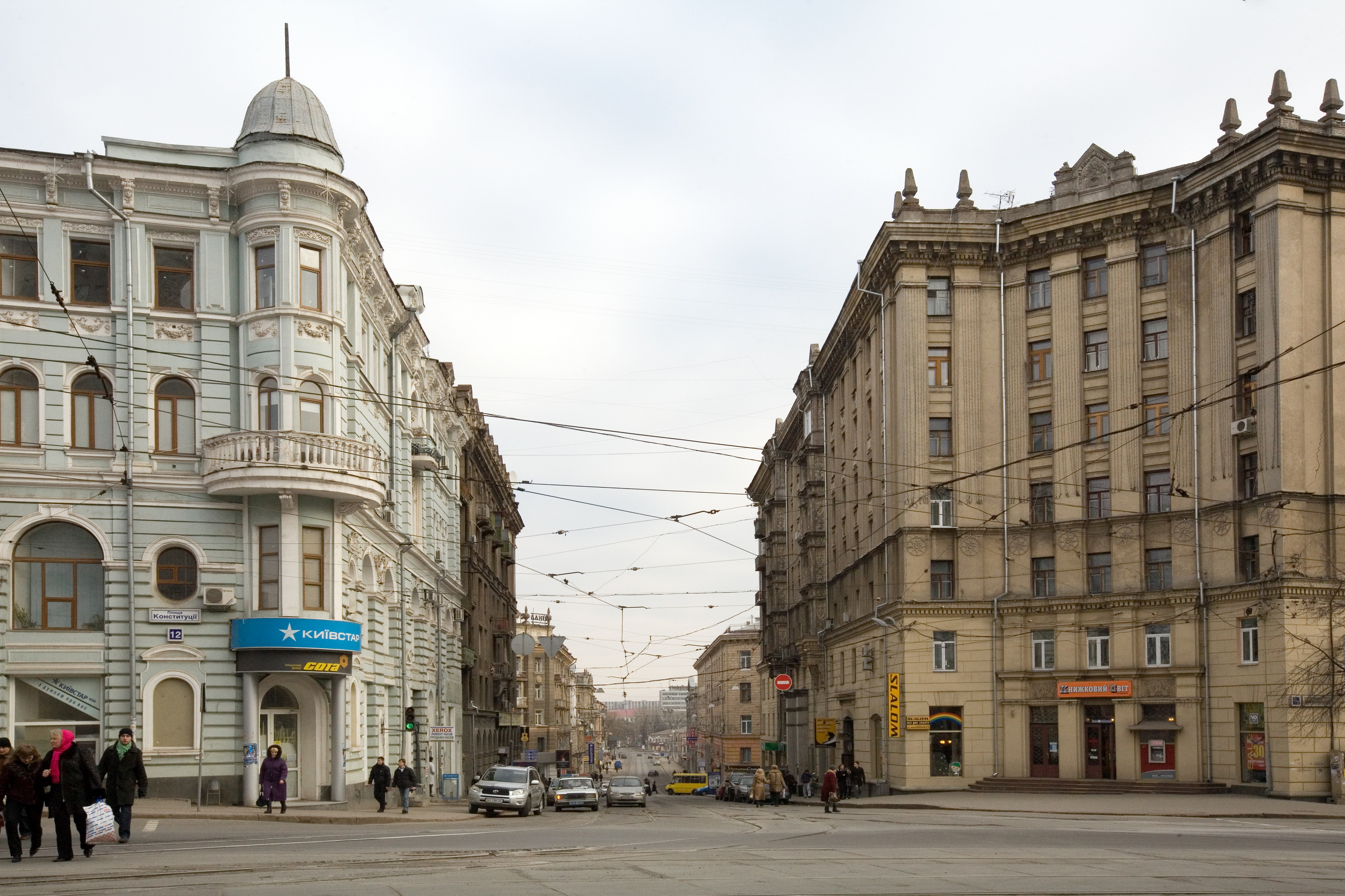 The beginning of Moskovsky prospekt